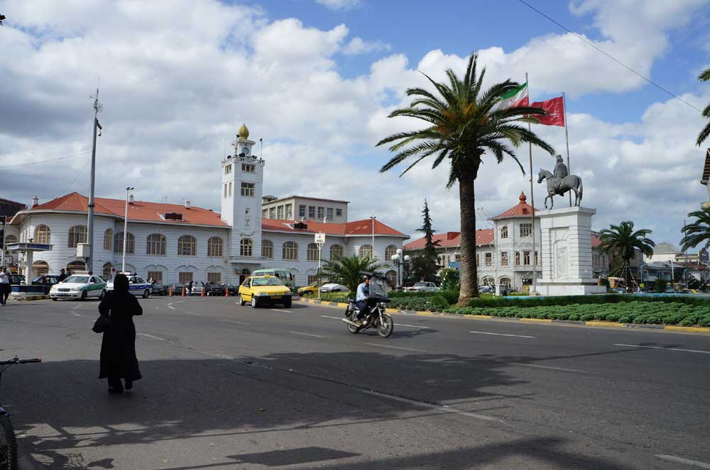 Rasht 2013 (12)